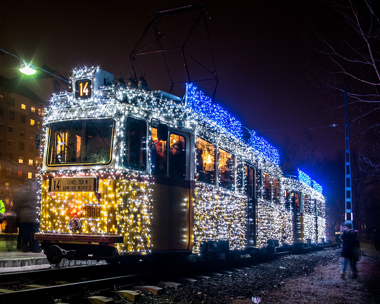 UV fényvillamos a 14-es vonalán 2016-ban